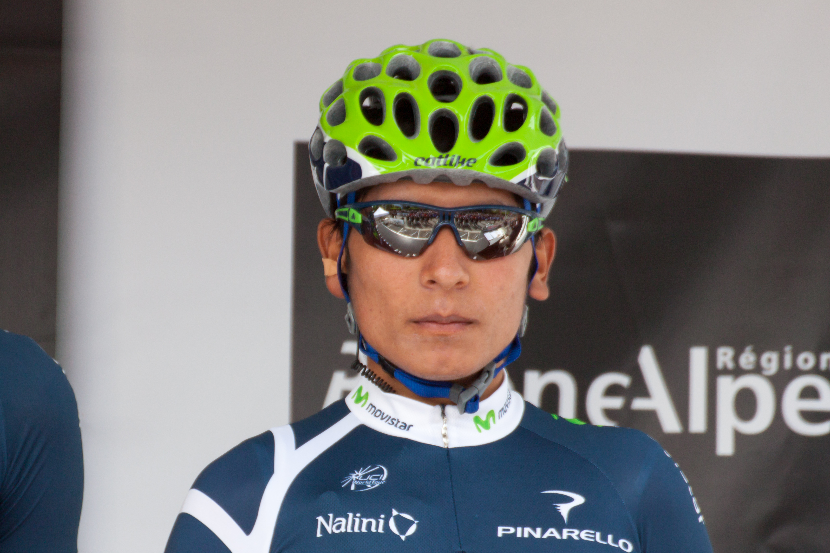 Nairo Quintana lors de la présentations des coureurs avant la première étape du Critérium du Dauphiné 2012